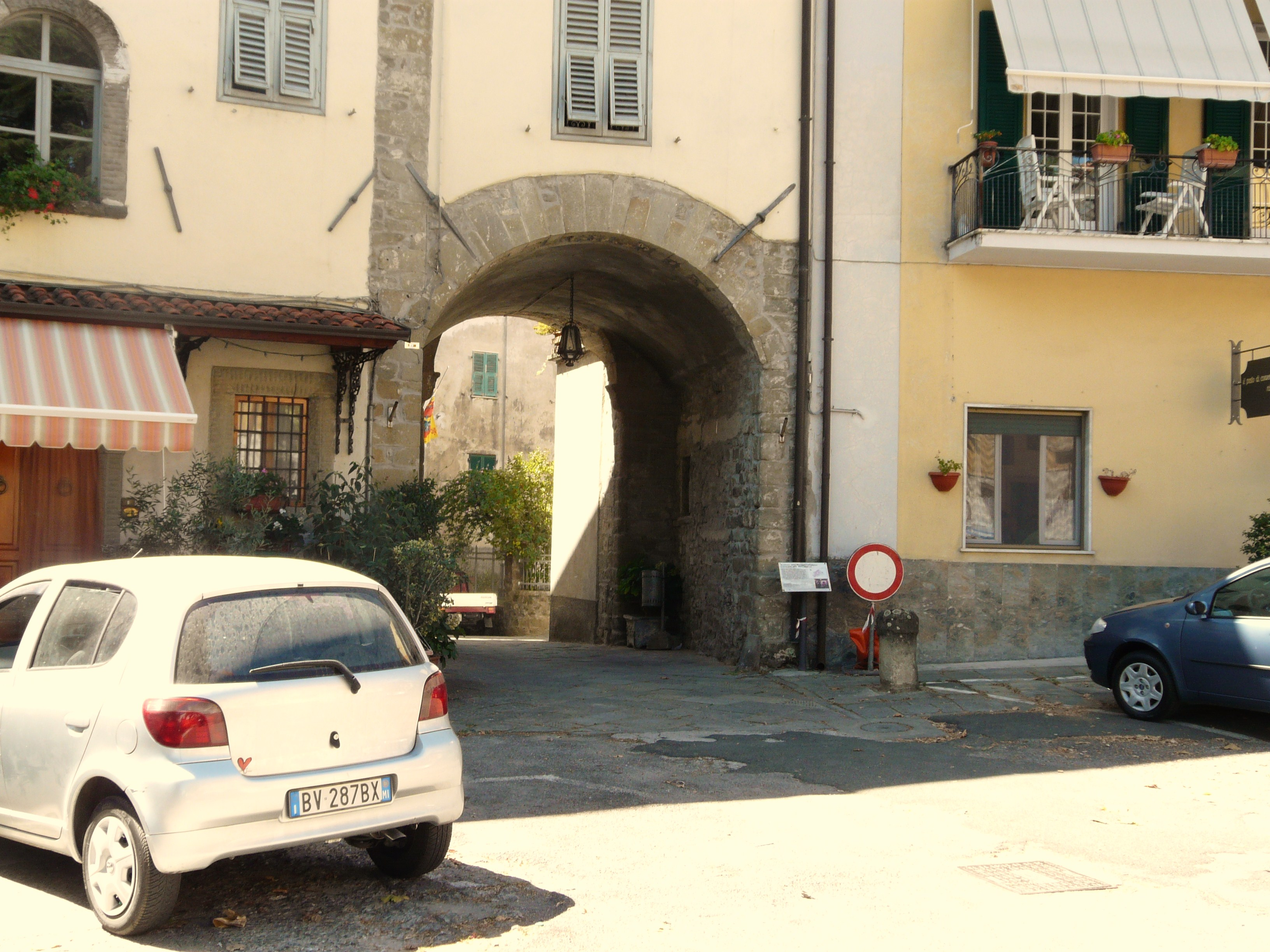 Porta detta "Lucchese" o "Nuova", Fivizzano, Toscana, Italia